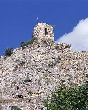 Vejs Kula nad gradom Livno